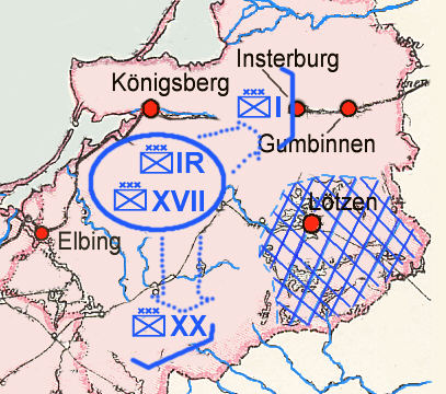 Den tyske plan for forsvaret af Østprøjsen august 1914.